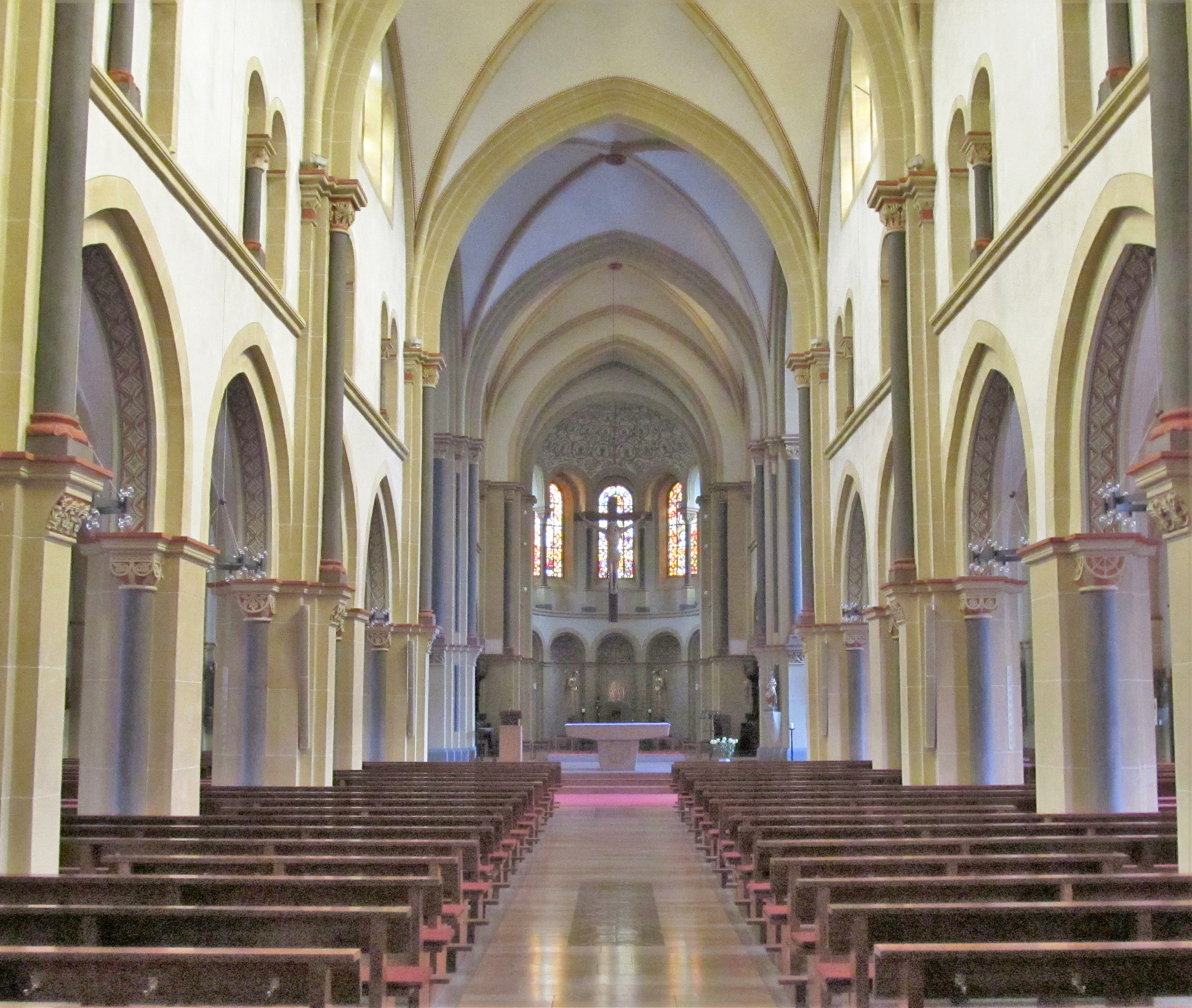 Blick ins Innere der katholischen Pfarrkirche St. Marien in Neunkirchen, Saarland